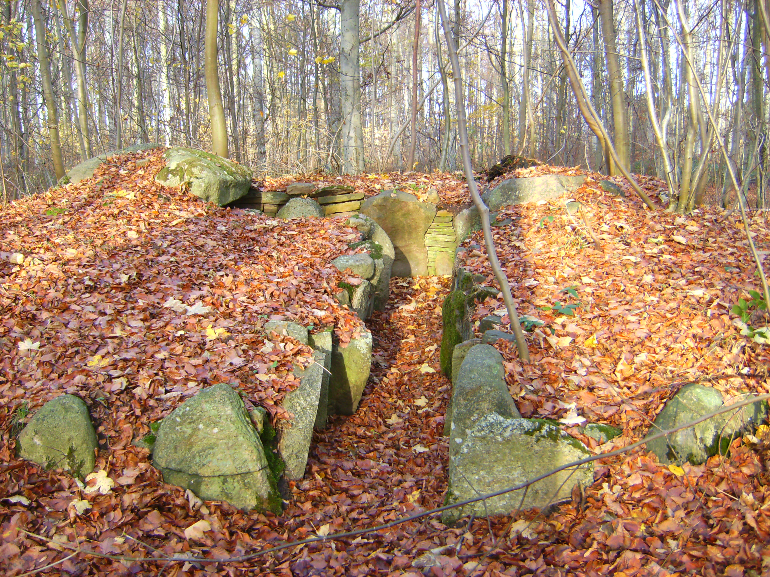 Oldtidsgrave i FrejlevSkov nord for Nysted Tomb in a forest east of Nysted, Denmark